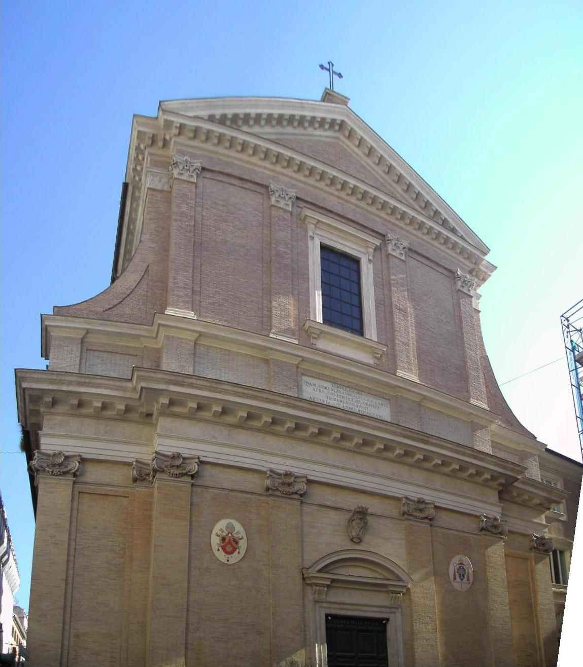 Roma , sant'Andrea delle Fratte, facciata